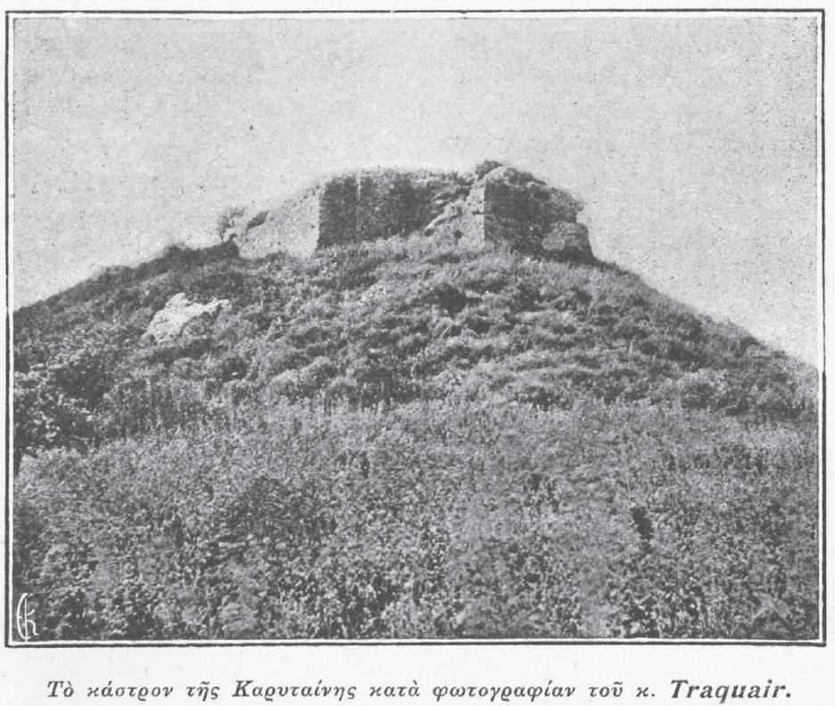 Die Karytaina Burg auf Pelopones